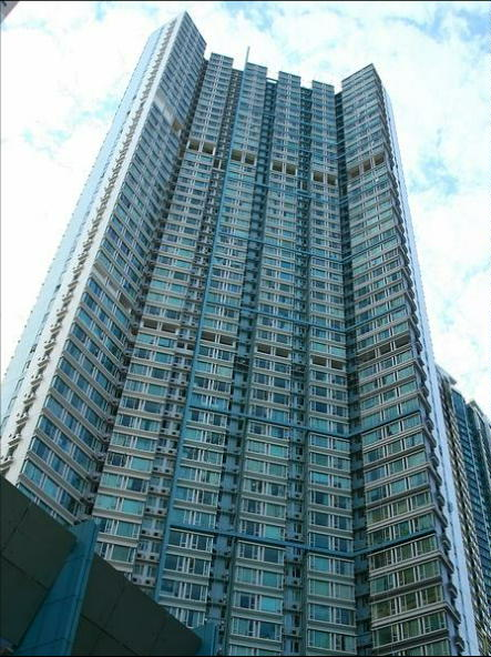 中文（香港）: 樂悠居圖片1